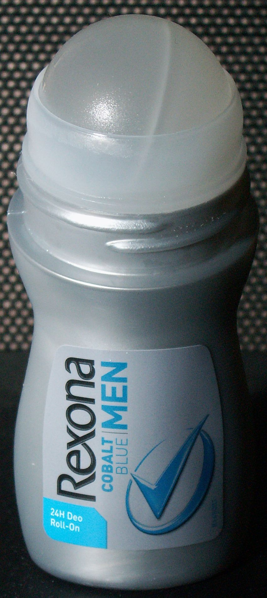 Desodorante masculino a bolilla (destapado).